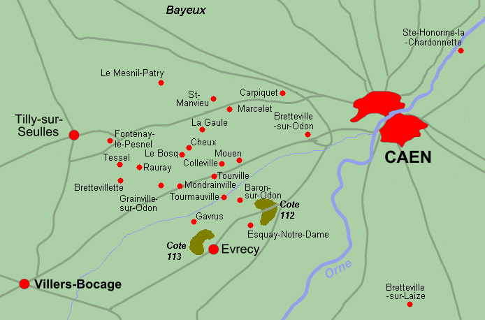 Lieux nécessaires à la compréhension de l'opération Epsom